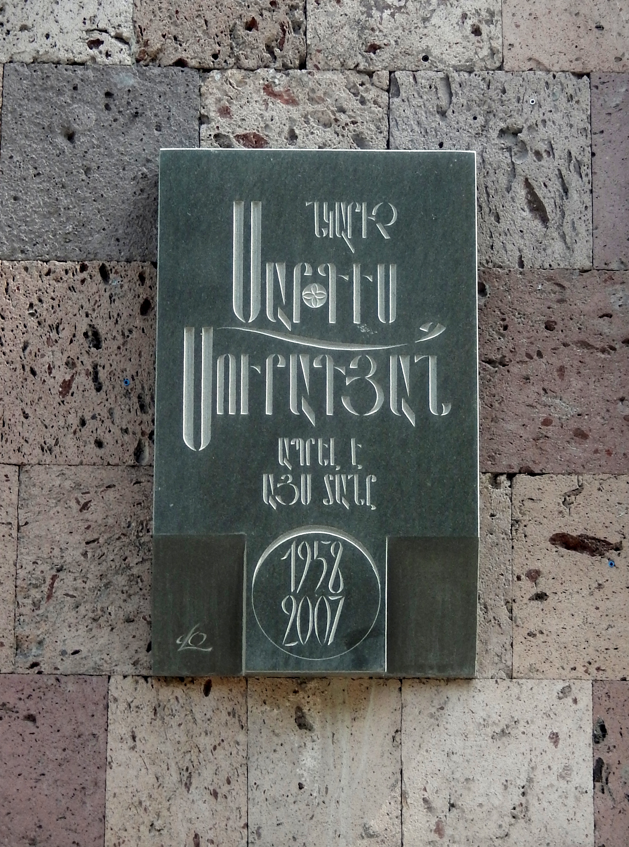 Սարգիս Մուրադյանի հուշատախտակը Երևանի Կիևյան փողոցի 24 շենքի պատին